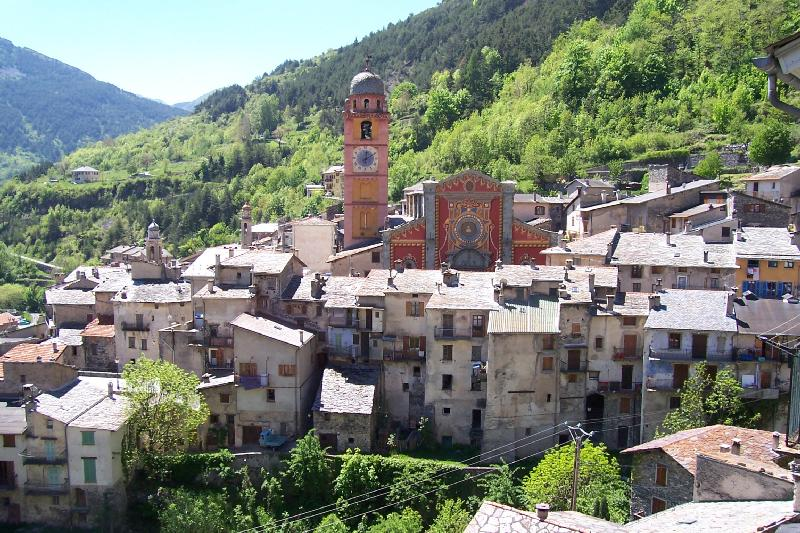 Photo de la Collégiale de Tende prise par JJ1 depuis "la place du Traou"